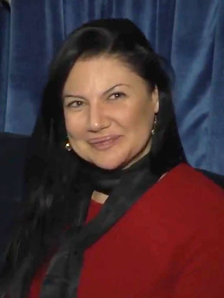 Alejandra Avalos en una entrevista.